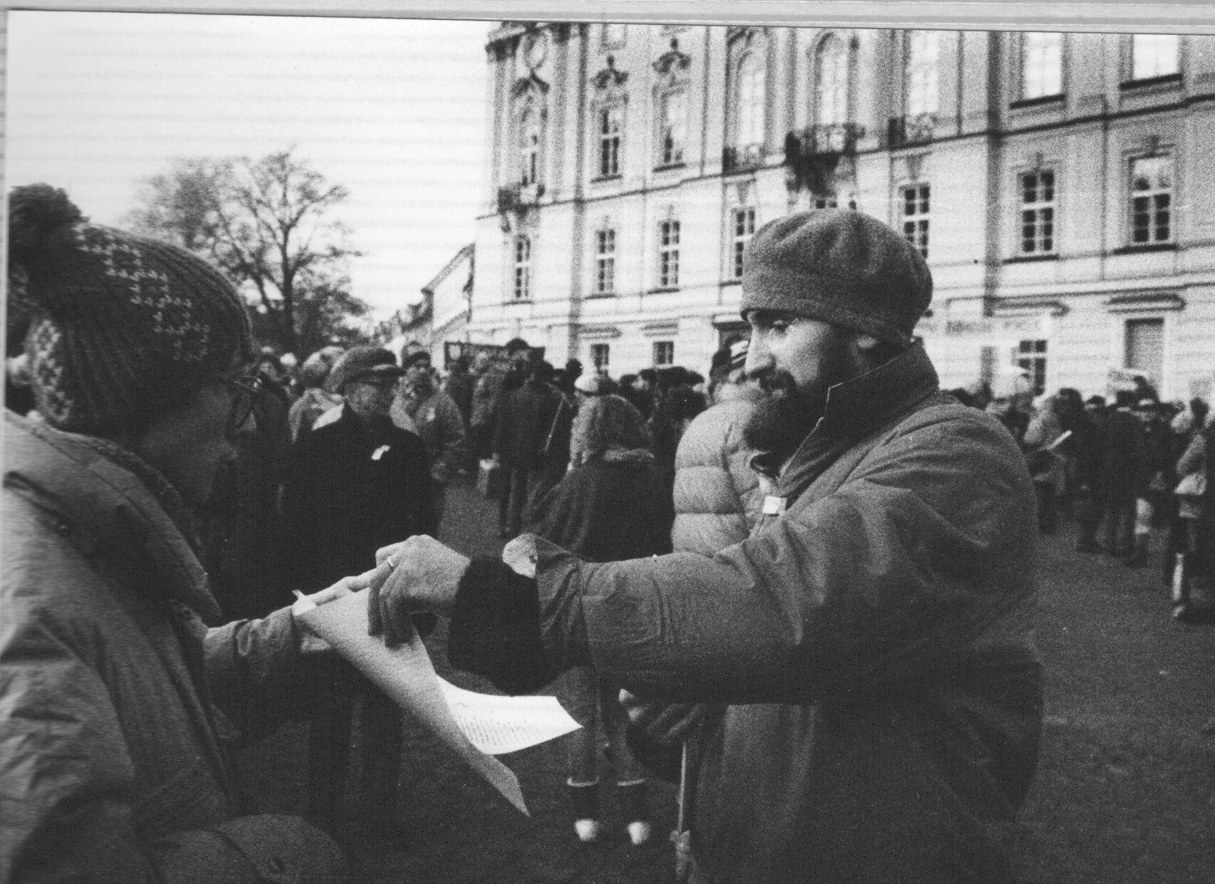 S. Novotný na Hradčanském náměstí v Praze po svatořečení Anežky české, 12. 11. 1989